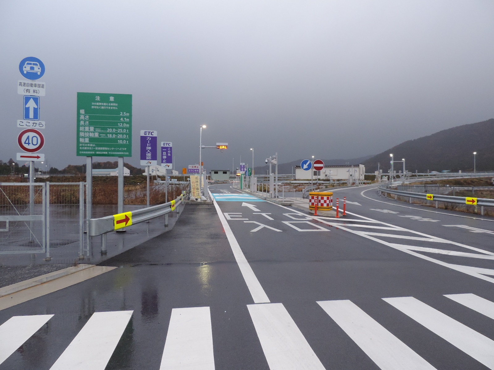 小谷城スマートインターチェンジ下り線出入口。2017年撮影